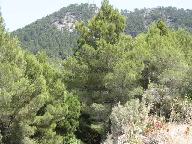 Sa Talaia - widok na szczyt (anteny telekomunikacyjne).